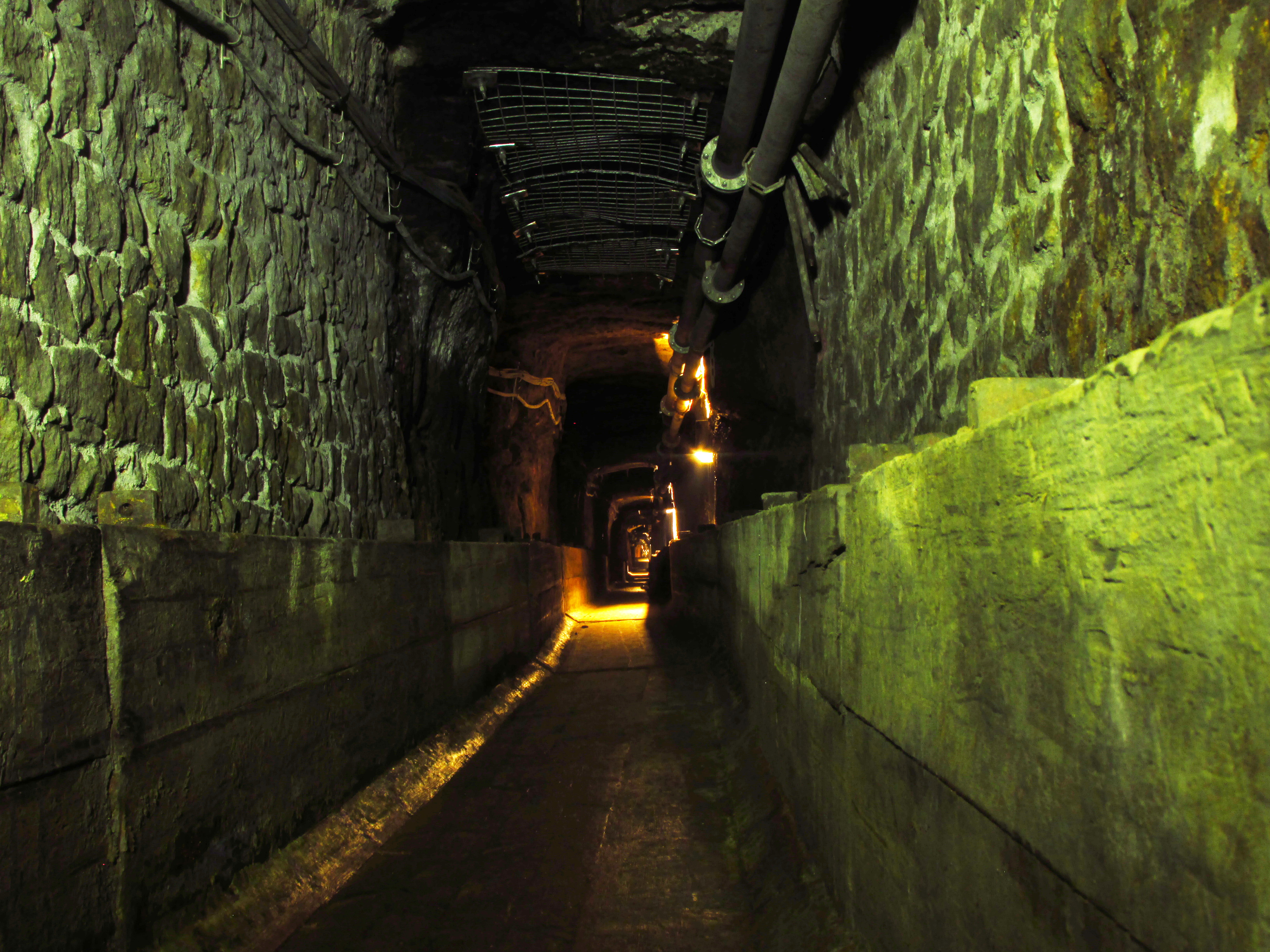 Zabrze, Główna Kluczowa Sztolnia Dziedziczna, drewniane koryta w nitce południowej